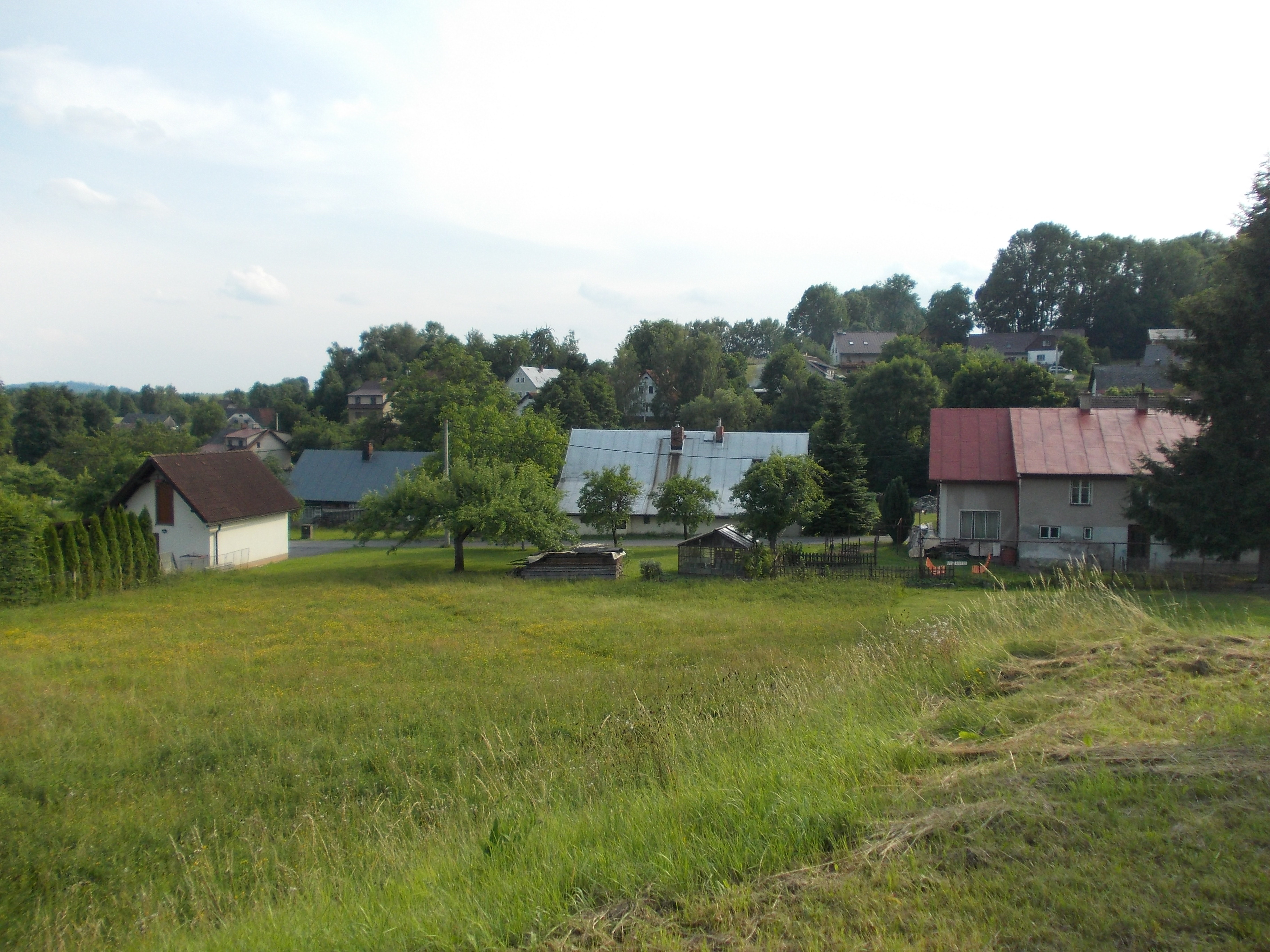 Valteřice - pohled na jižní část od východu